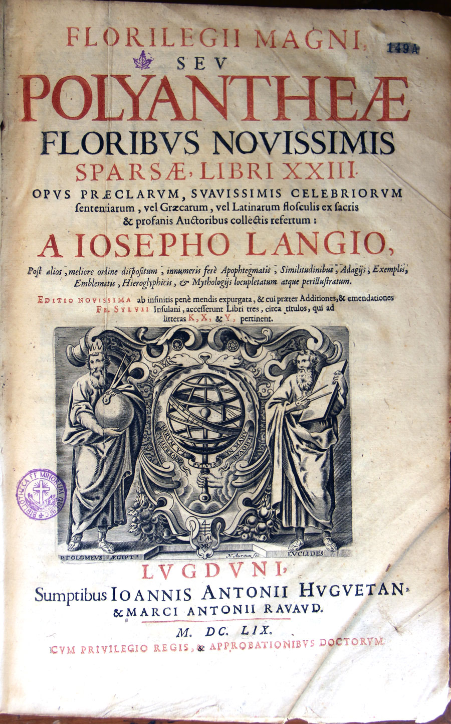 Page couverture du Polyanthea de Joseph Lang d'après Nani Mirabelli, édition de 1659.